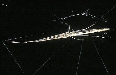 female Tetragnatha javana from Okinawa.